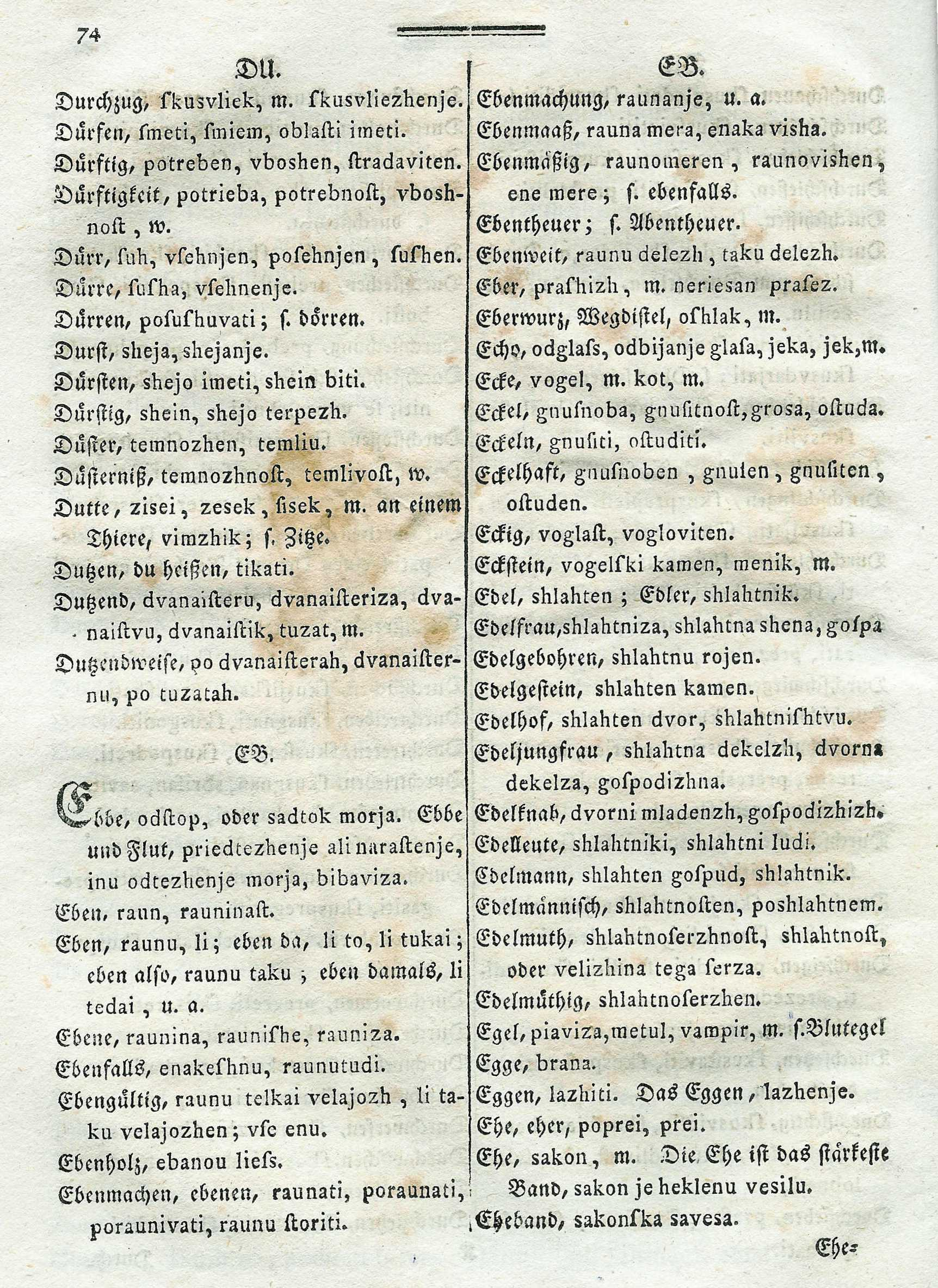 Deutsch - Windisches Woerterbuch, page 74